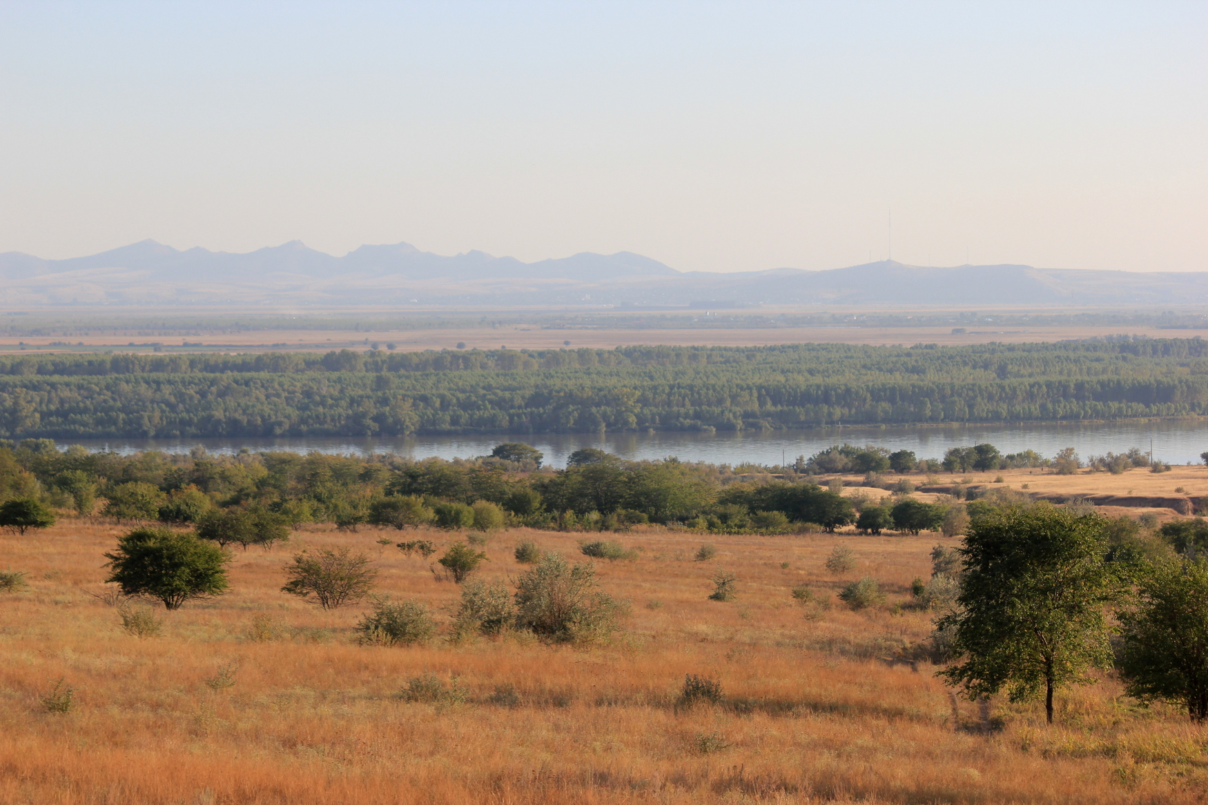 Blick auf die Donau und die Macin-Berge bei Galați im Dreiländereck Rumänien-Moldawien-Ukraine.